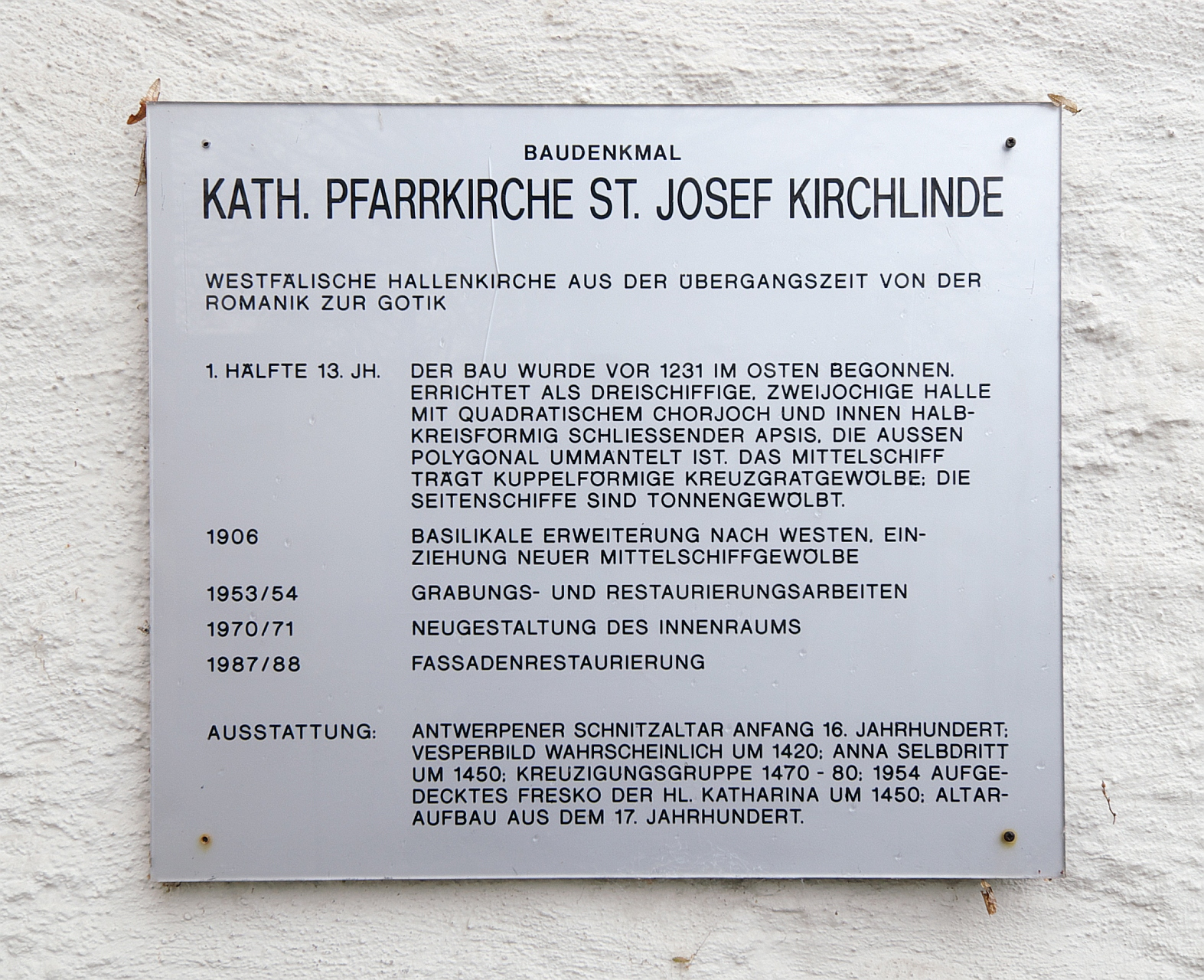 Katholische Kirche St. Josef (Dortmund-Kirchlinde)